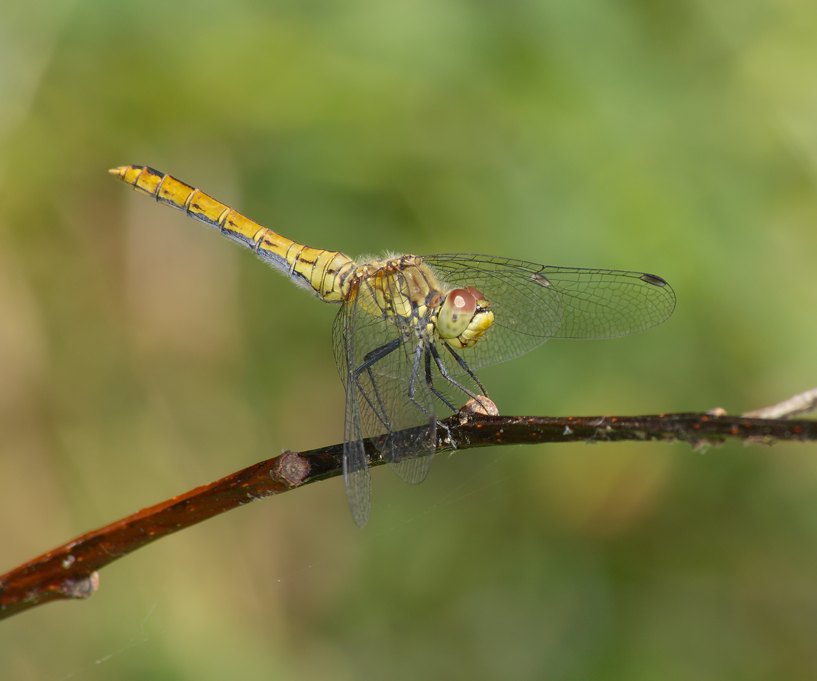 Blutrote Heidelibelle - Sympetrum sanguineum, Weibchen. Aufgenommen in Wöllnau Winkelmühle, Doberschütz, Sachsen, Deutschland.